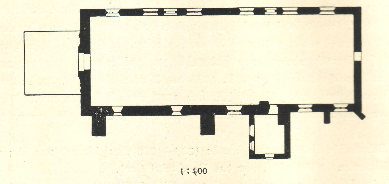 Ev.-luth. Kirche Bergkirchen